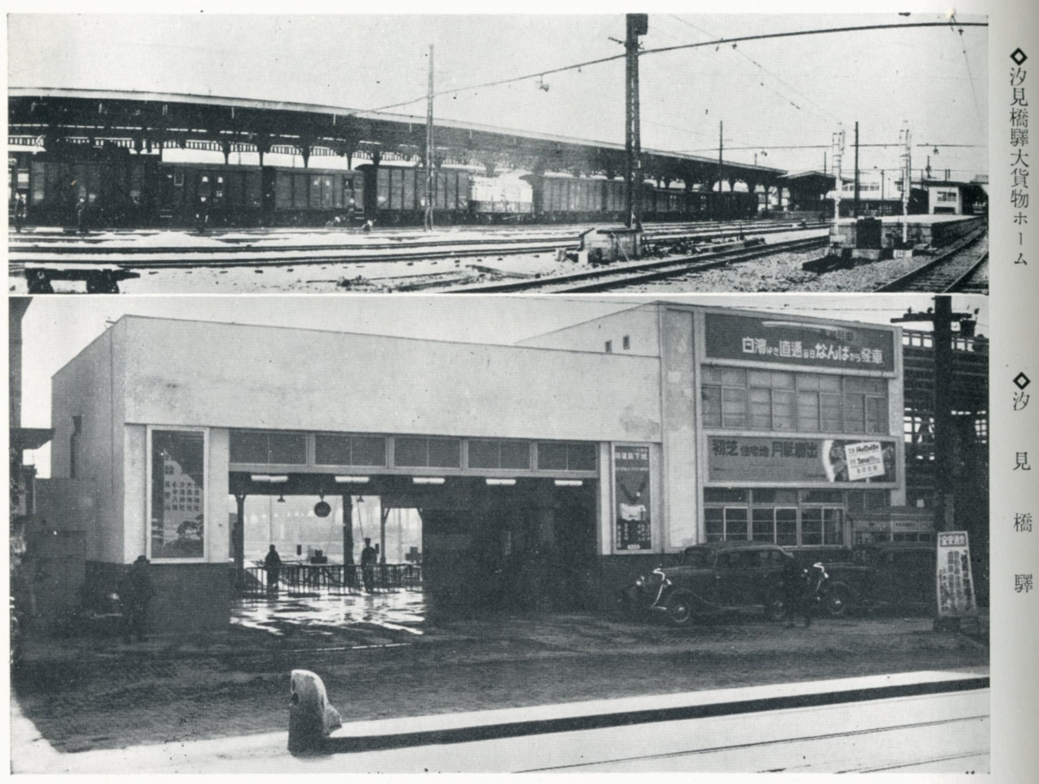 1935年(昭和10年)頃の南海鉄道(当時)汐見橋駅。 1935年5月15日から1ヶ月間(『南海電気鉄道百年史』P222)、南海が大売出しをした初芝住宅地の広告がある。汐見橋駅舎の写真は『開通五十年』(南海鉄道株式会社、1936年3月)にも同じものが掲載されている。ちなみに、出典書籍に掲載されている南海ビルディングの写真は広告からして1935年の撮影である。